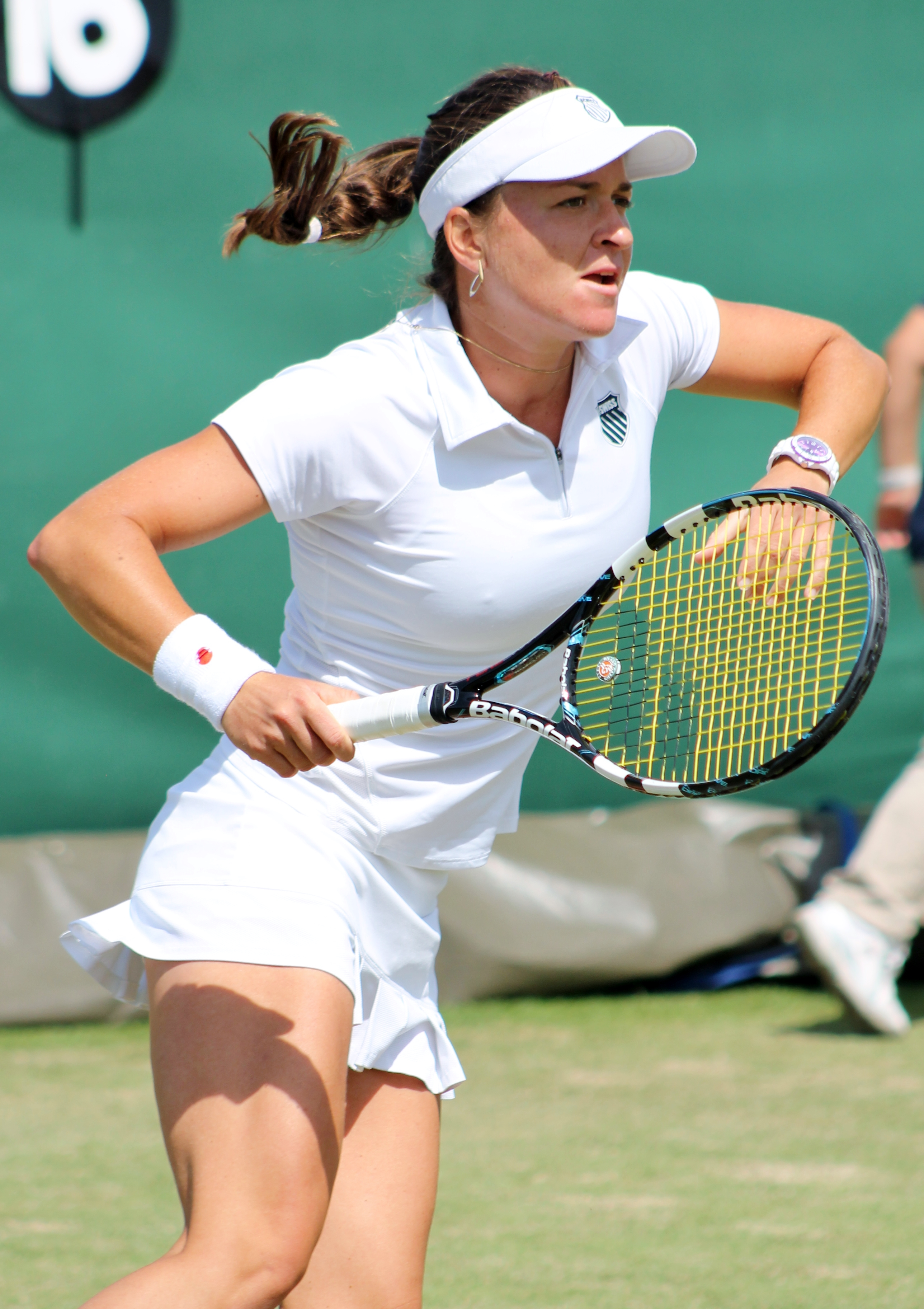 Dulgheru WMQ14 (26)